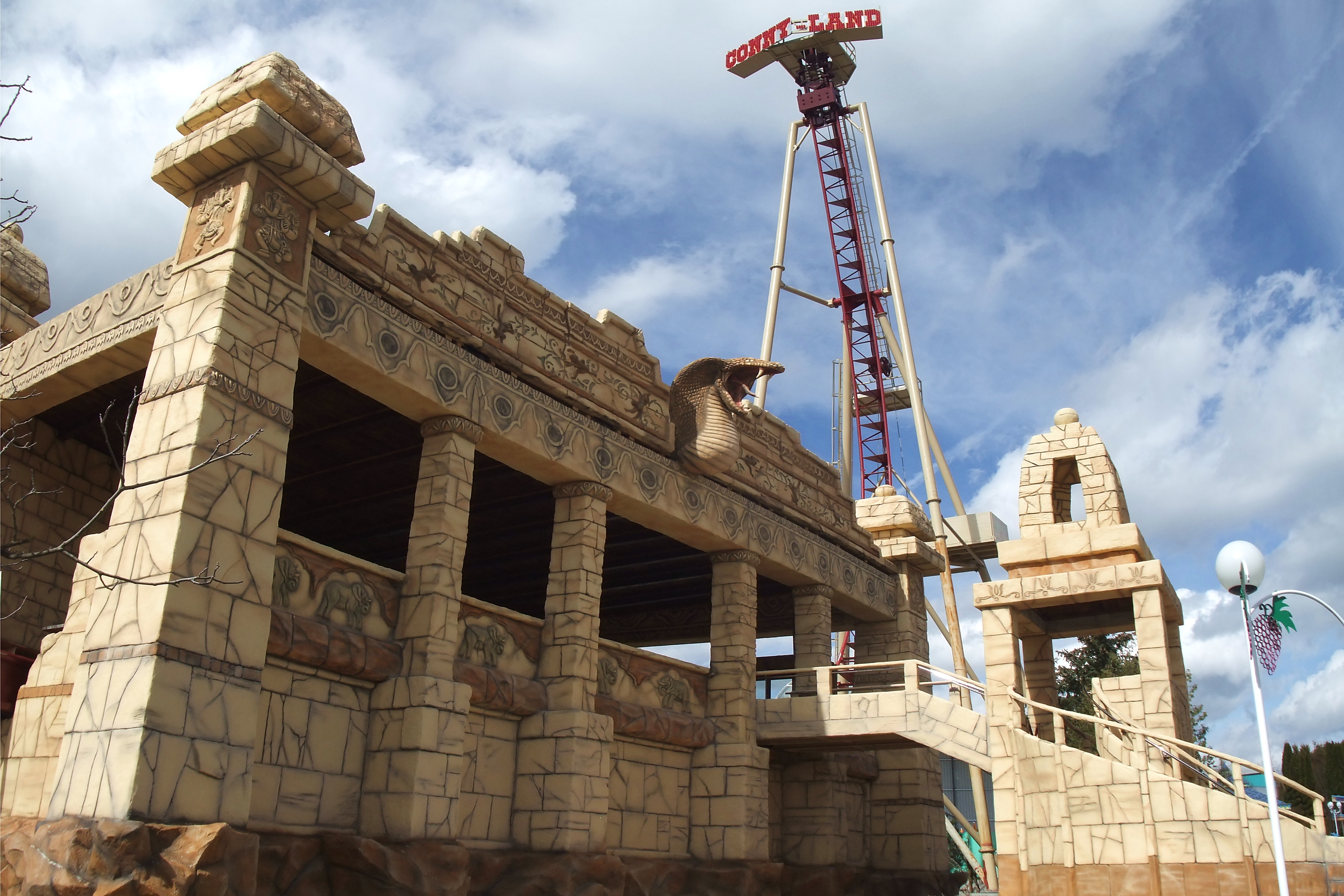 Das Eingangsgebäudes der Achterbahn Copra im Connyland, Lipperswil, Schweiz